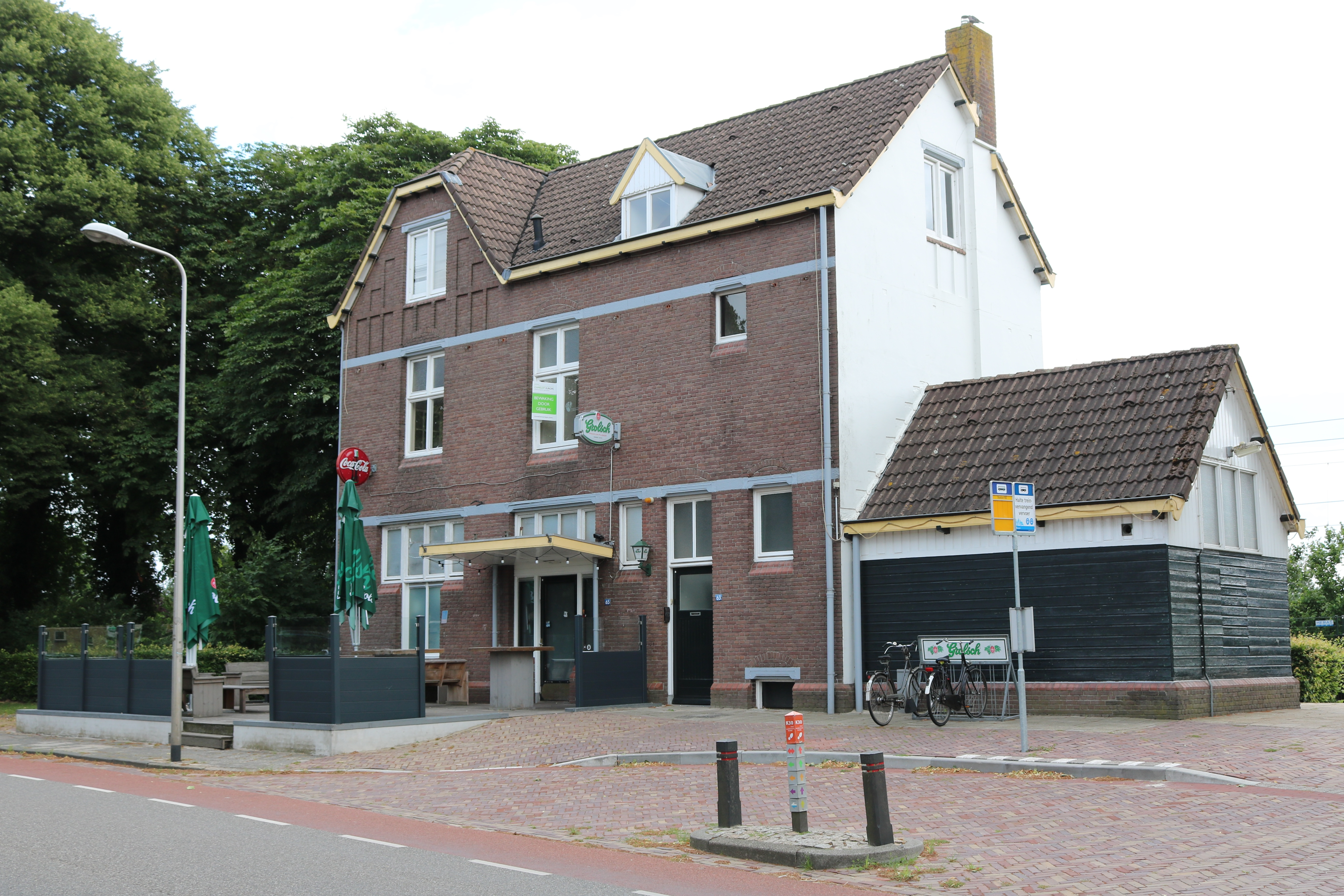 Station Gramsbergen (foto: Daniel van der Ree, 23 juni 2018)